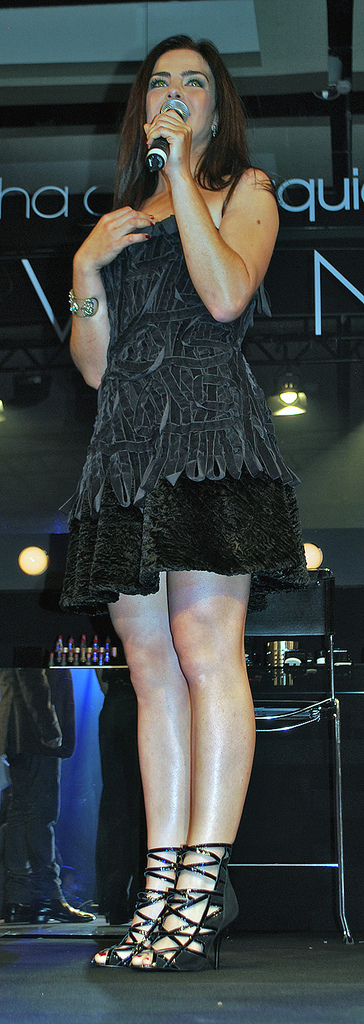 Ana Paula Arósio num evento da AVON.